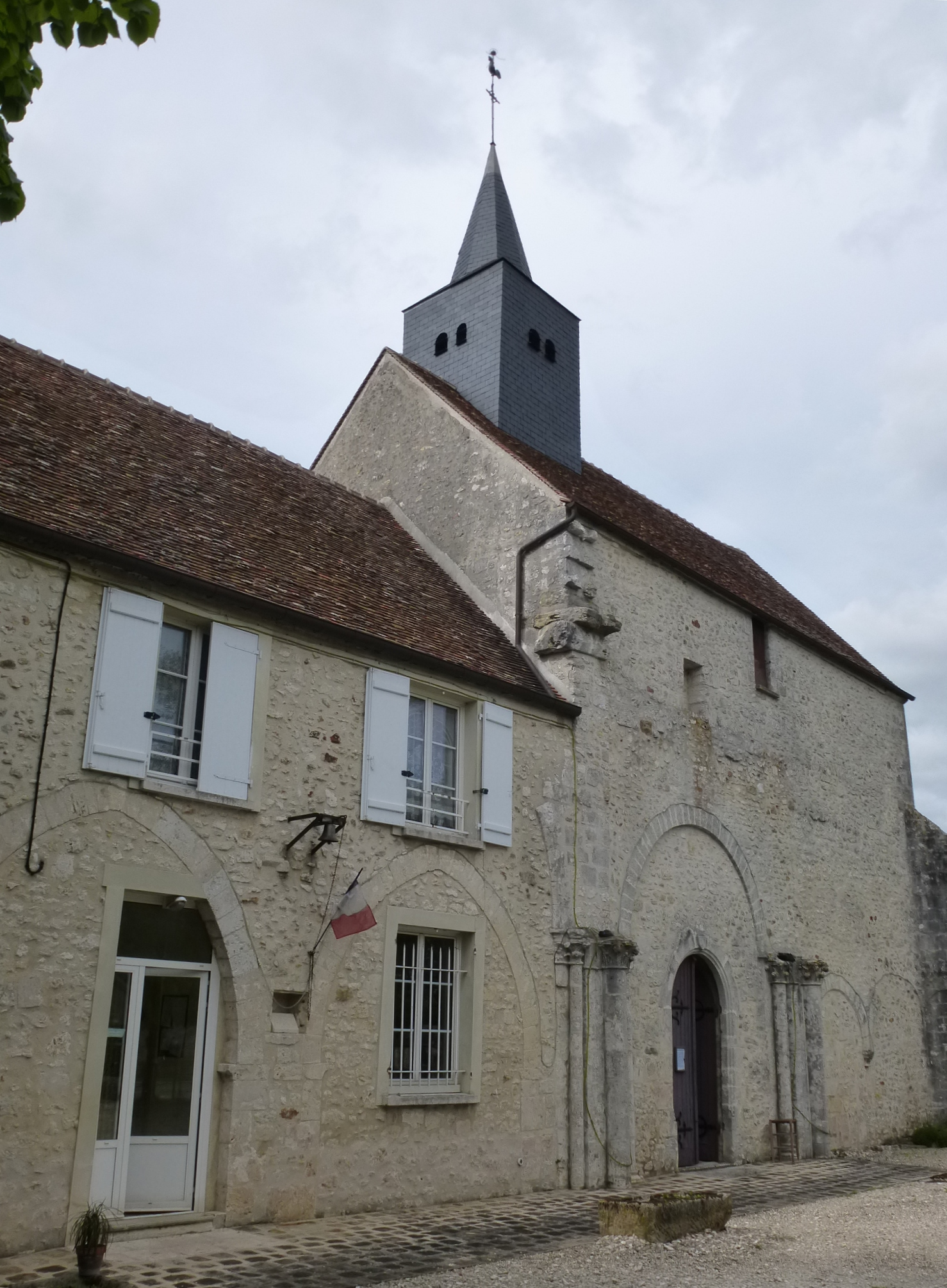 Église Saint-Blaise-Saint-Léger de Vulaines-lès-Provins. Seul le chœur de l'église demeure affecté au culte. (département de la Seine-et-Marne, région Île-de-France).